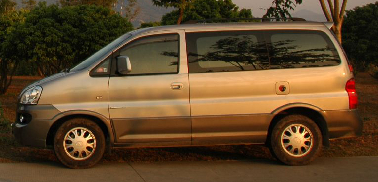 Jianghuai Refine Ruifeng II (JAC HFC 6470/ HFC 6500)